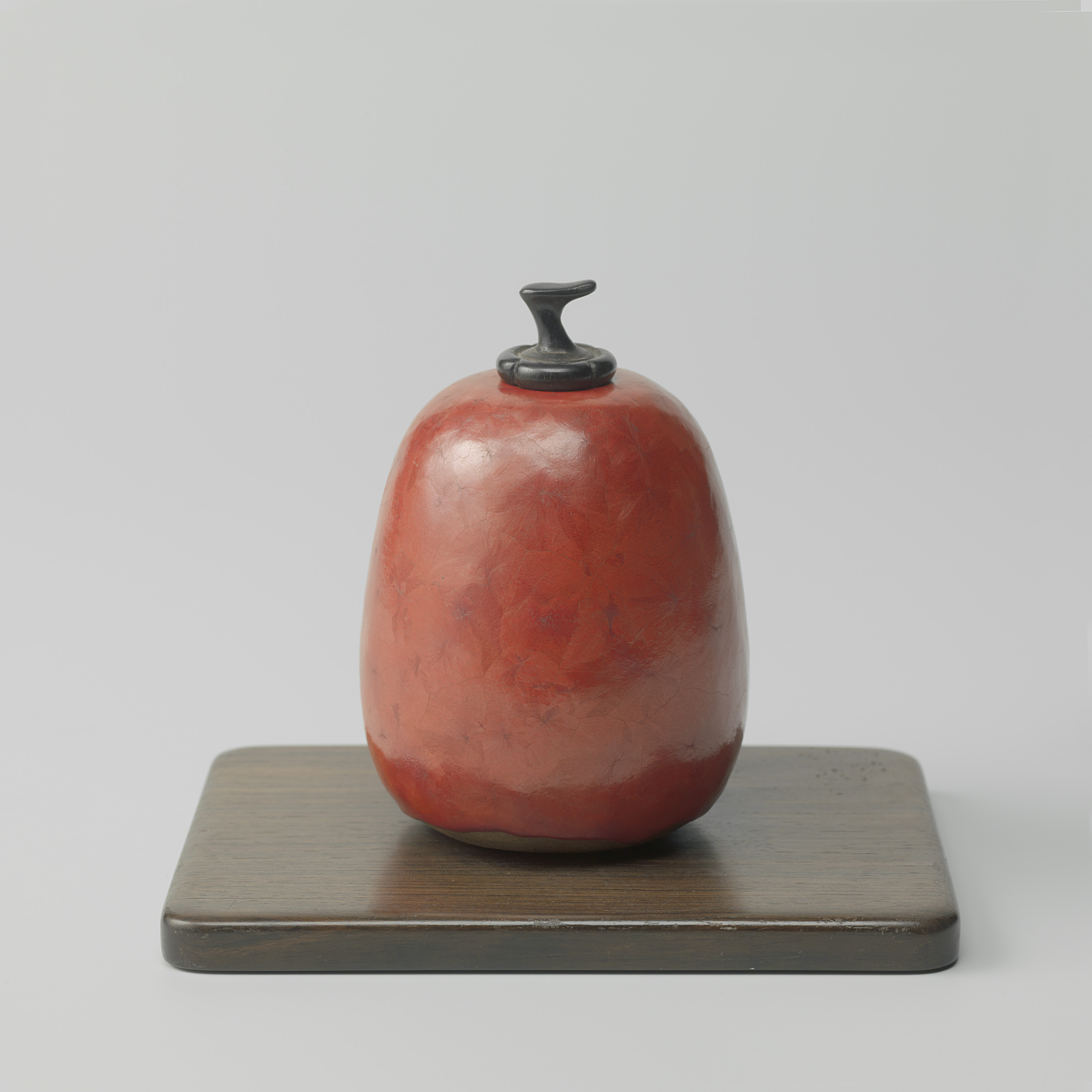 IdentificatieTitel(s): Houten plank voor peervormige potObjecttype: plank pot Objectnummer: BK-1970-51-1Opschriften / Merken: merk: ‘Hsim’Omschrijving: Rechthoekig houten plankje.VervaardigingVervaardiger: vervaardiger: Henry Simmenhoutsnijder: O'kin SimmenDatering: ca. 1925Materiaal: pot: steengoed stop: hout voet: hout Techniek: glazuren / snijdenAfmetingen: h 0,9 cm. × b 13,8 cm. × d 10,3 cm. Verwerving en rechtenCredit line: Aankoop met steun van de Stichting tot Bevordering van de Belangen van het RijksmuseumVerwerving: aankoop 1970Copyright: Publiek domein